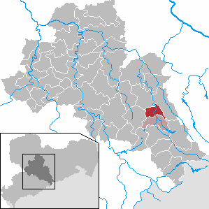 Weißenborn/Erzgeb. in Saxony - district Mittelsachsen